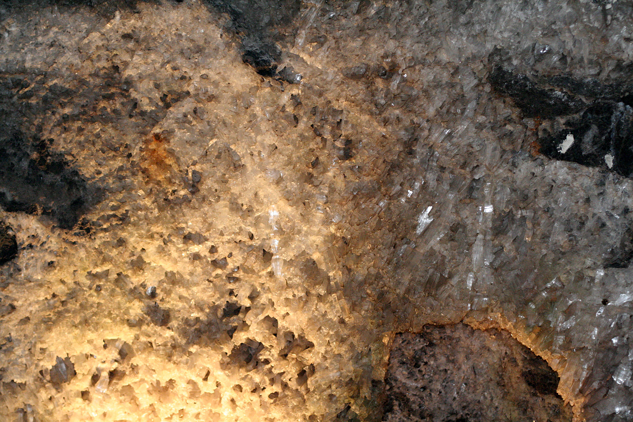 Beschreibung: In der Kristallgrotte der Marienglashöhle Friedrichroda Aufnahme vom Oktober 2006 Aufgenommen von Timo Sack